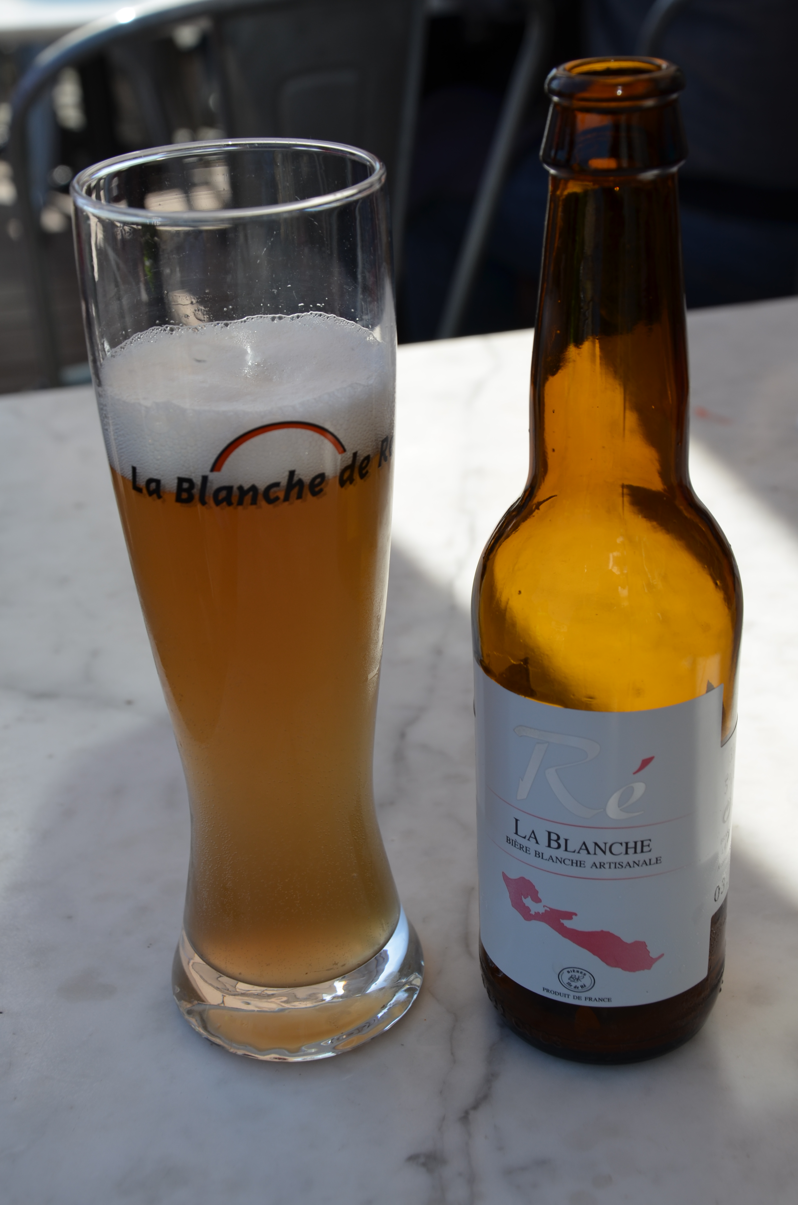 La "Blanche de Ré", bière blanche brassée sur l'Île de Ré.